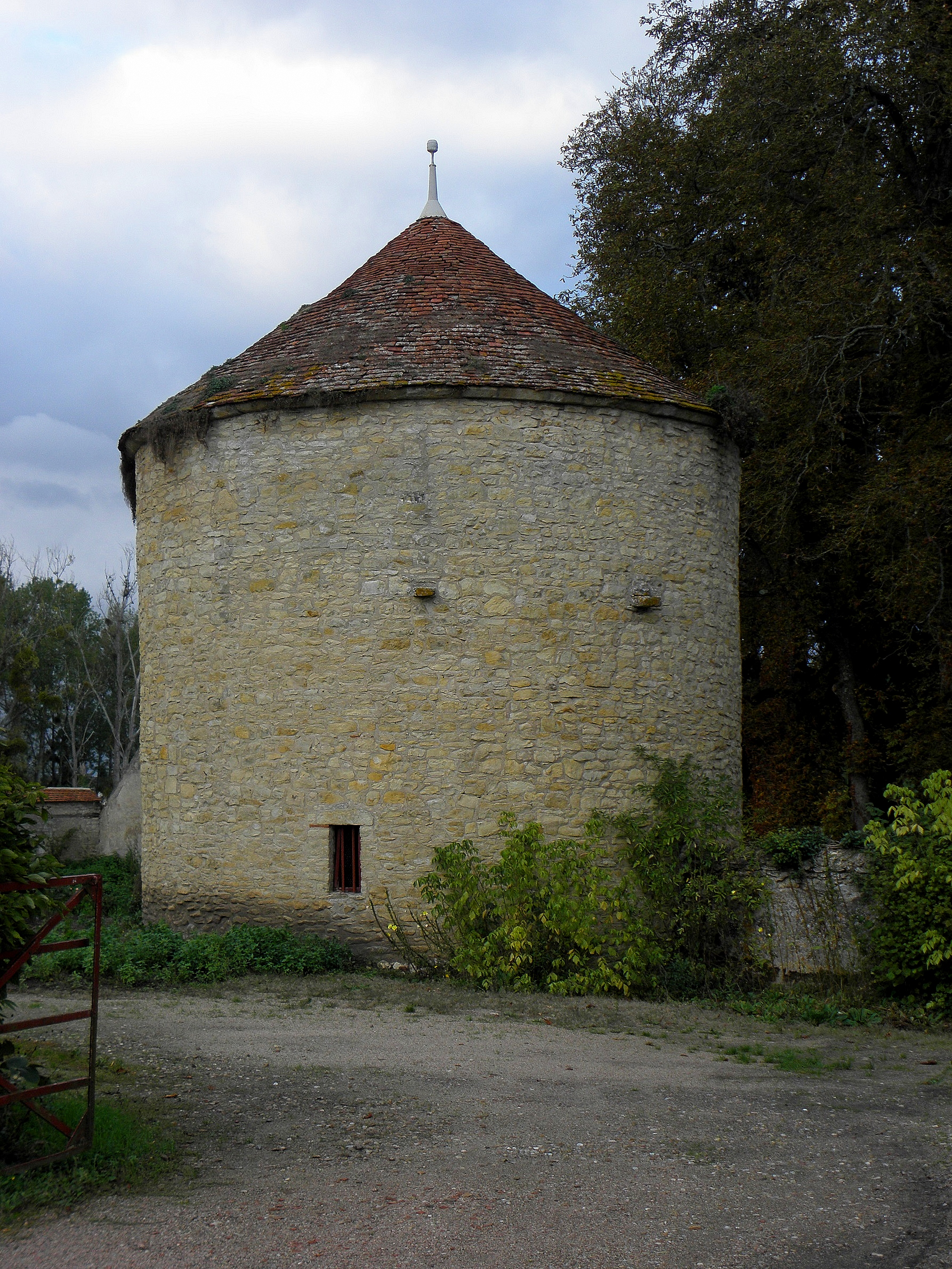 Château de Chevenon (58). Colombier.